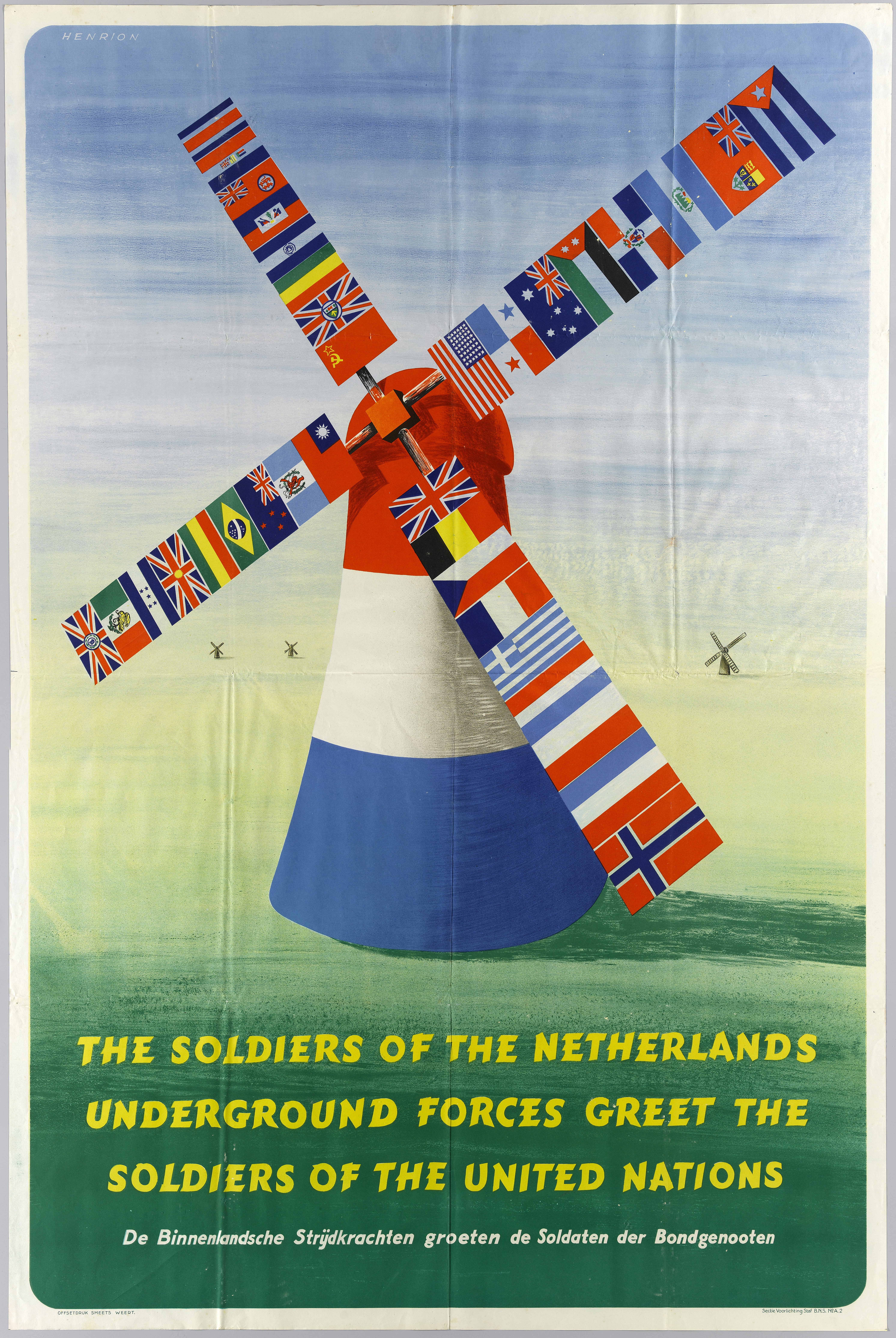 Poster verwelkoming soldaten United Nations. Opschrift: The soldiers of the Netherlands underground forces greet the soldiers of the united nations. De Binnenlandse strijdkrachten groeten de soldaten der bondgenoten.